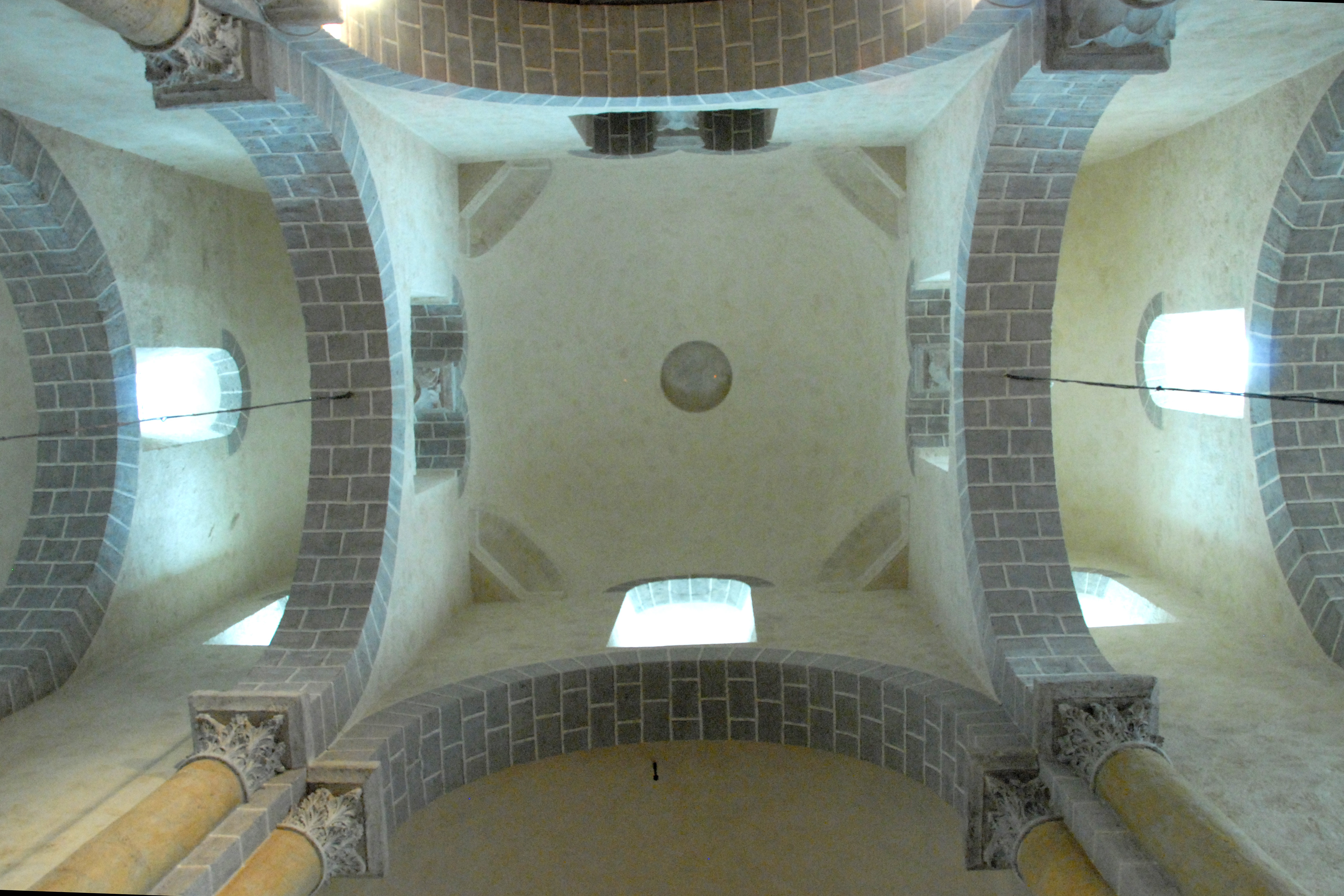 St.-Nectaire, massiv barlong, von unten